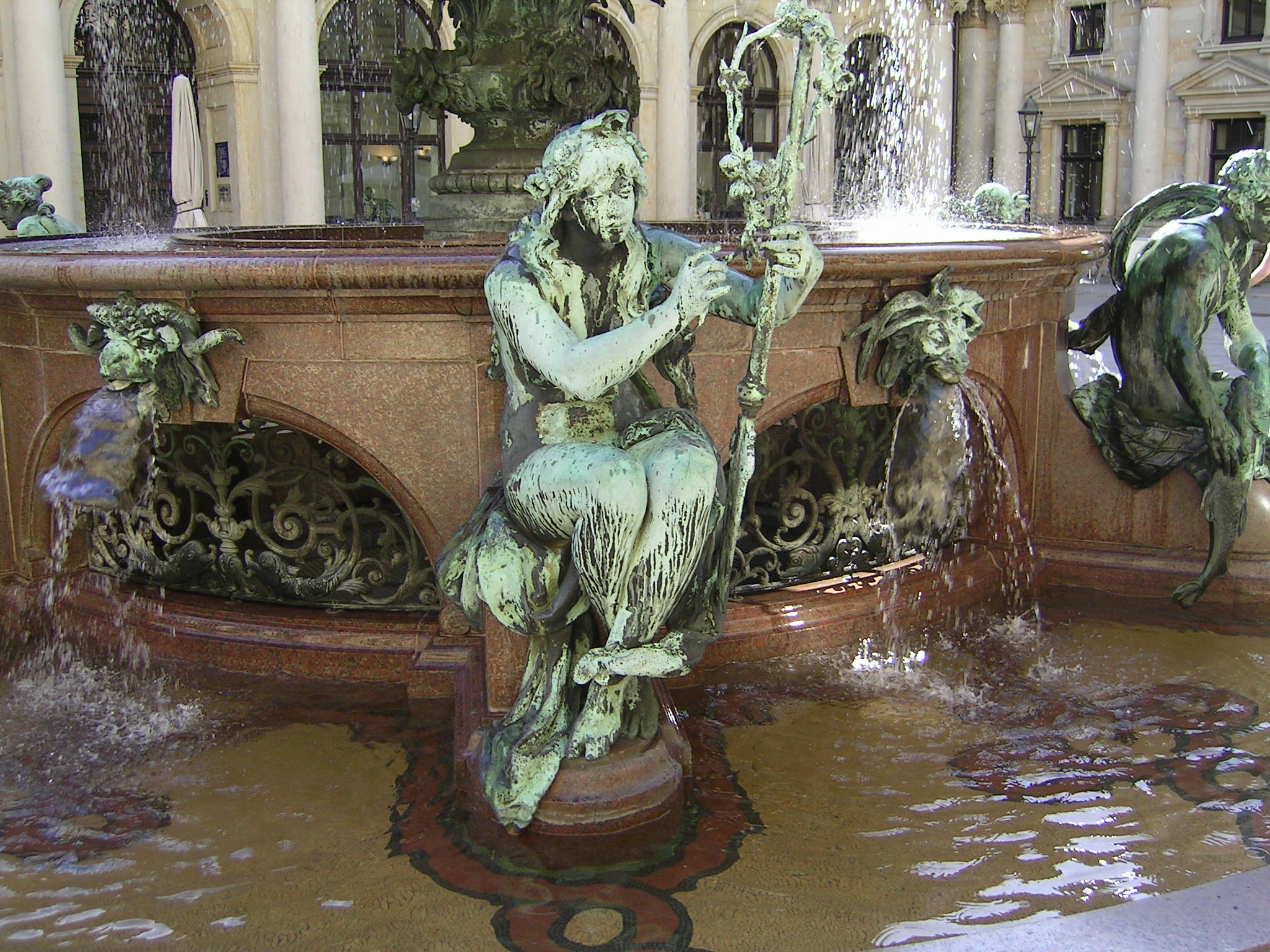 Hamburg Rathaus User:Tarawneh/rami